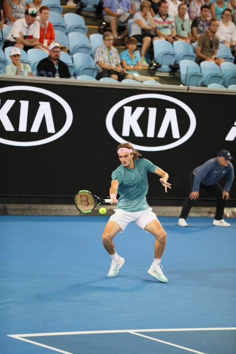 2019 Australian Open